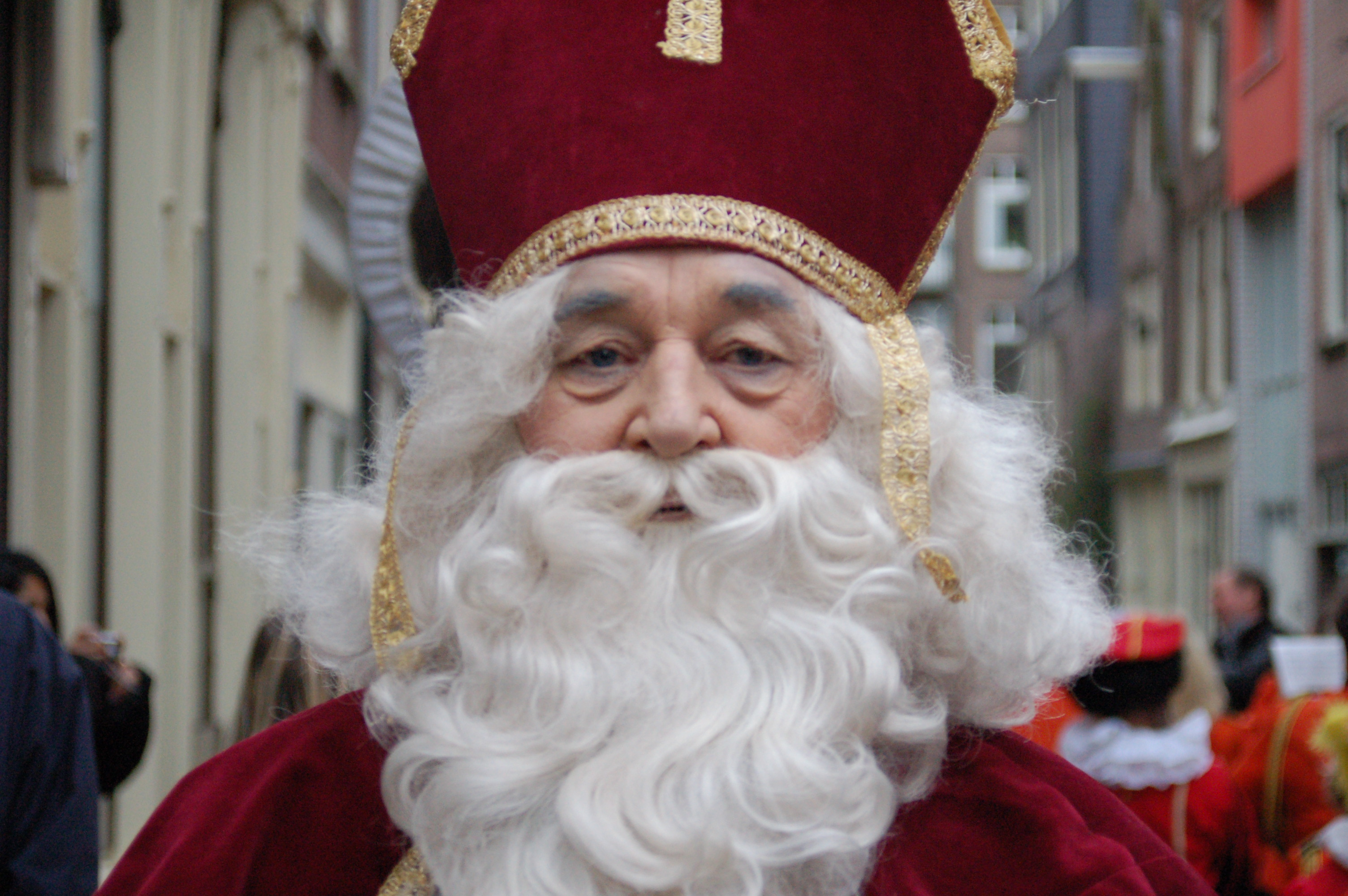 Portrait of Sinterklaas